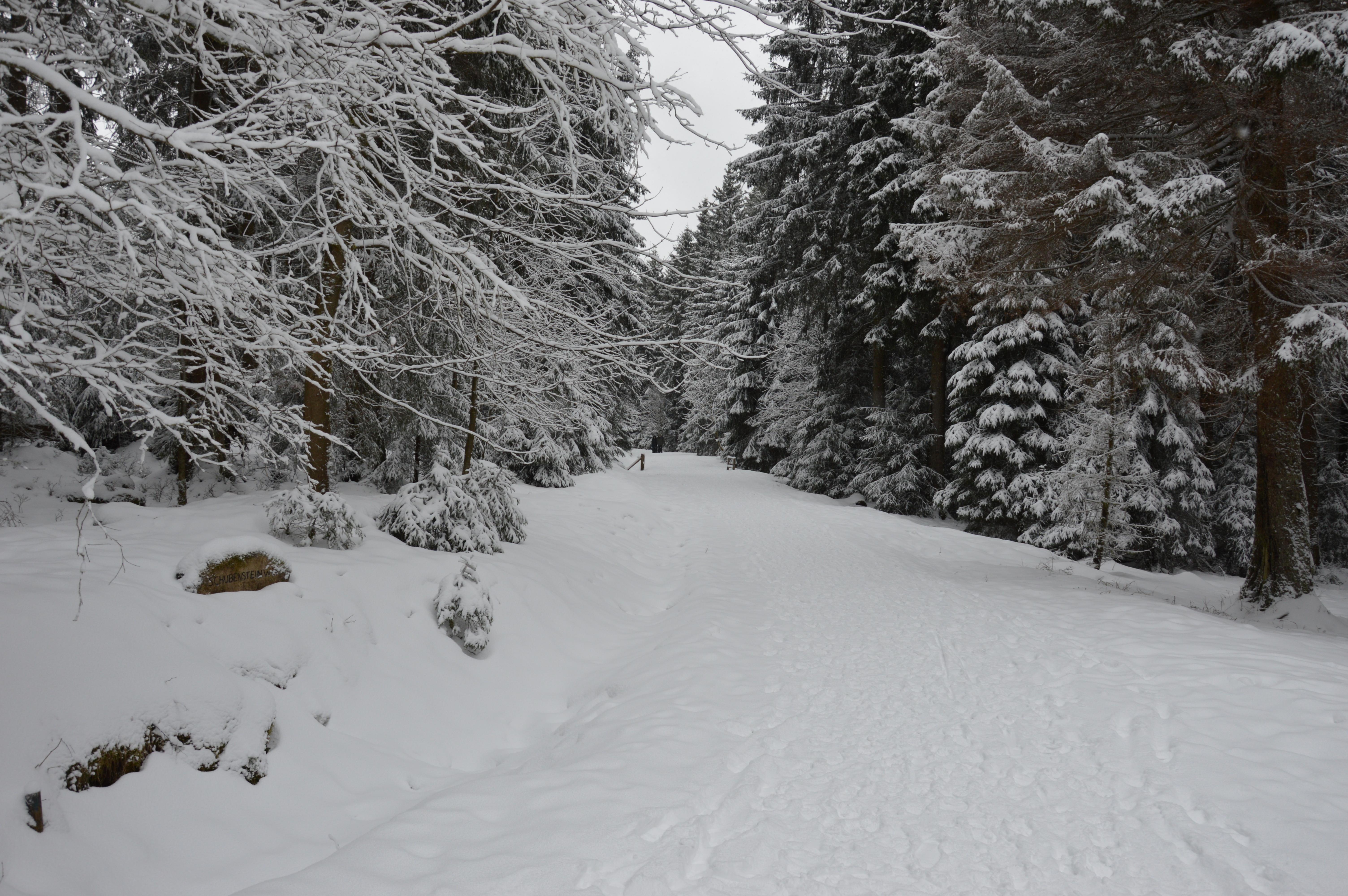 Schubensteinweg